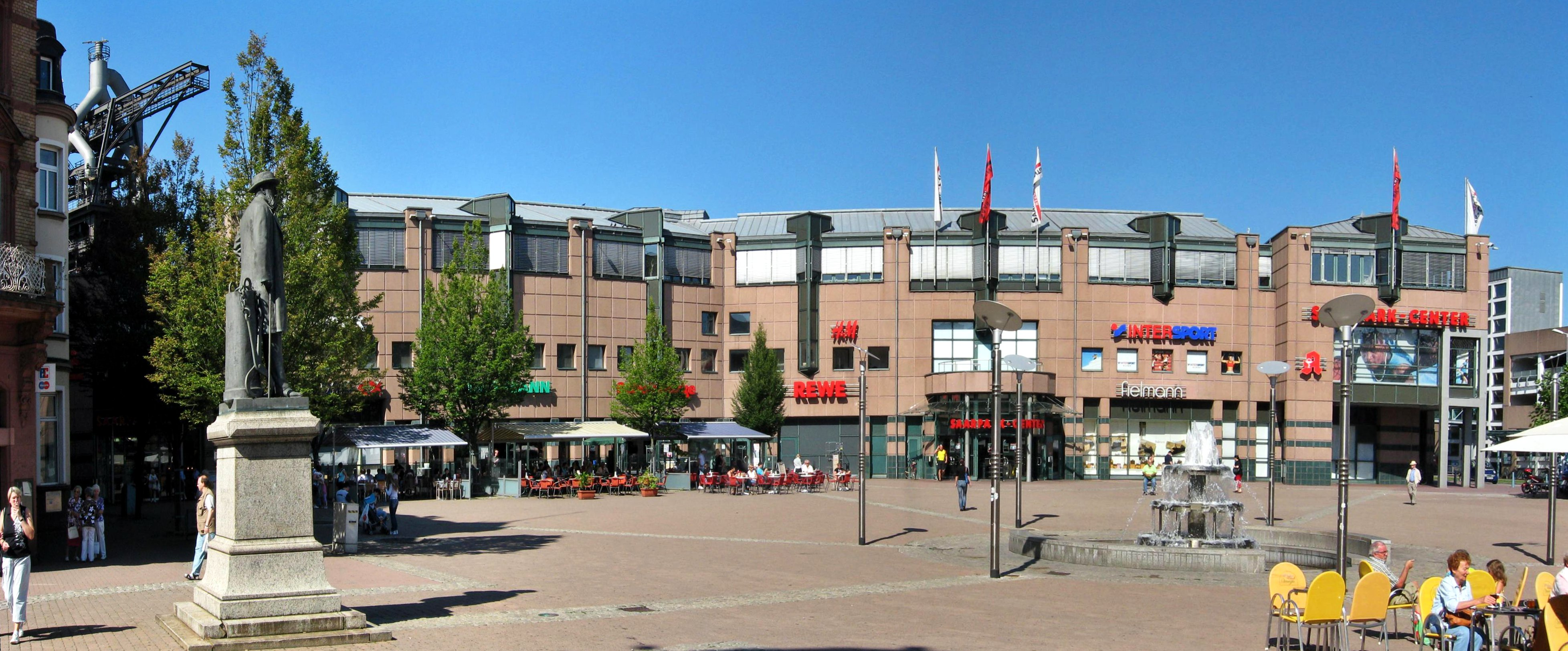 Einkaufszentrum "Saarparkcenter" in Neunkirchen.